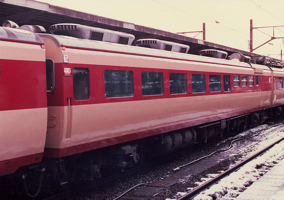 国鉄 サシ489-4